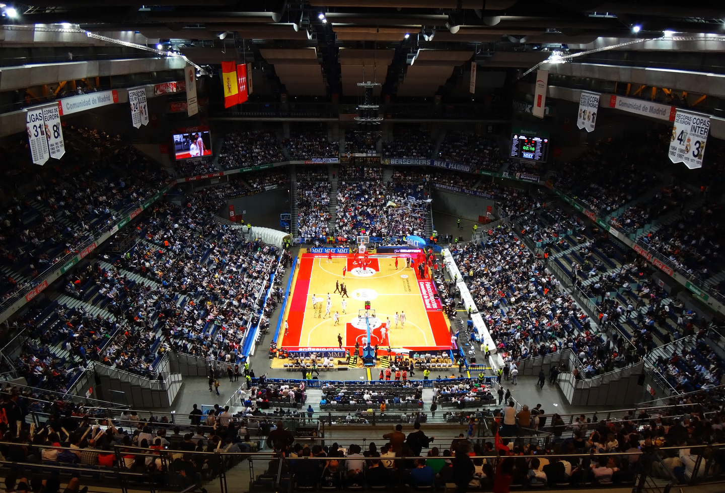 Перед матчем Реал - ЦСКА